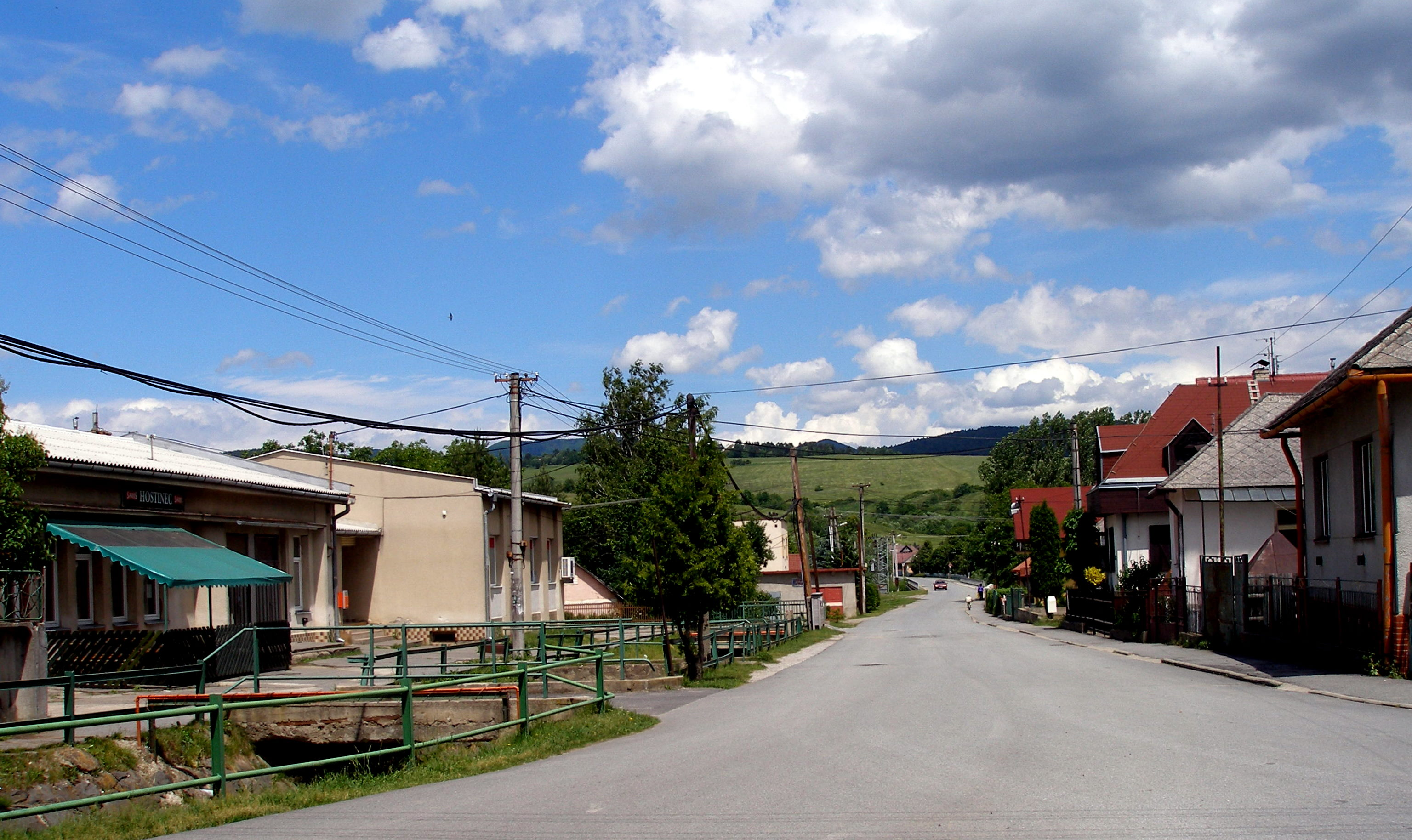 Obec Rožkovany okres Sabinov